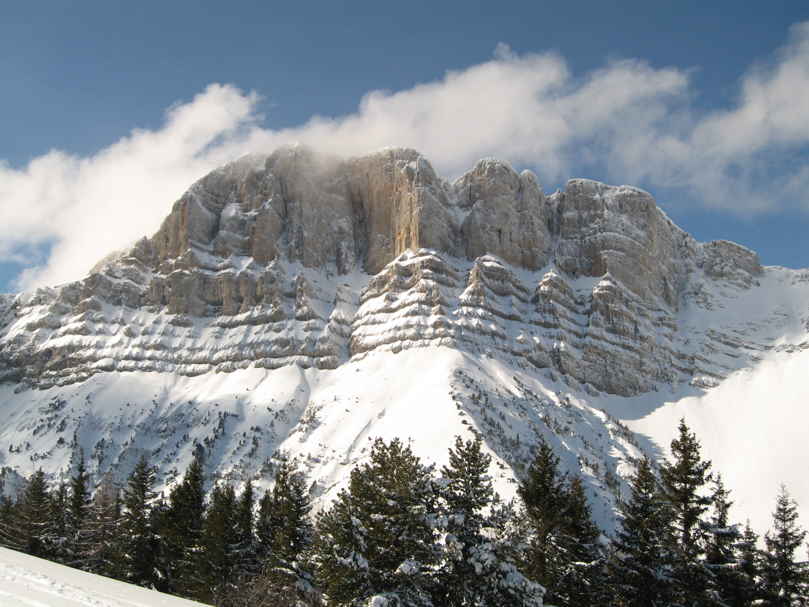 Le Grand Veymont (2341m) Point culminant du massif du Vercors - (P. Gaigé - Photo personnelle)